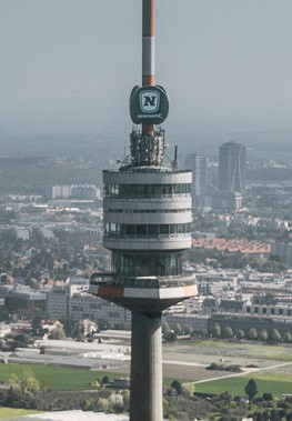 Der Turmkorb des Donauturms (Stand: 2019)